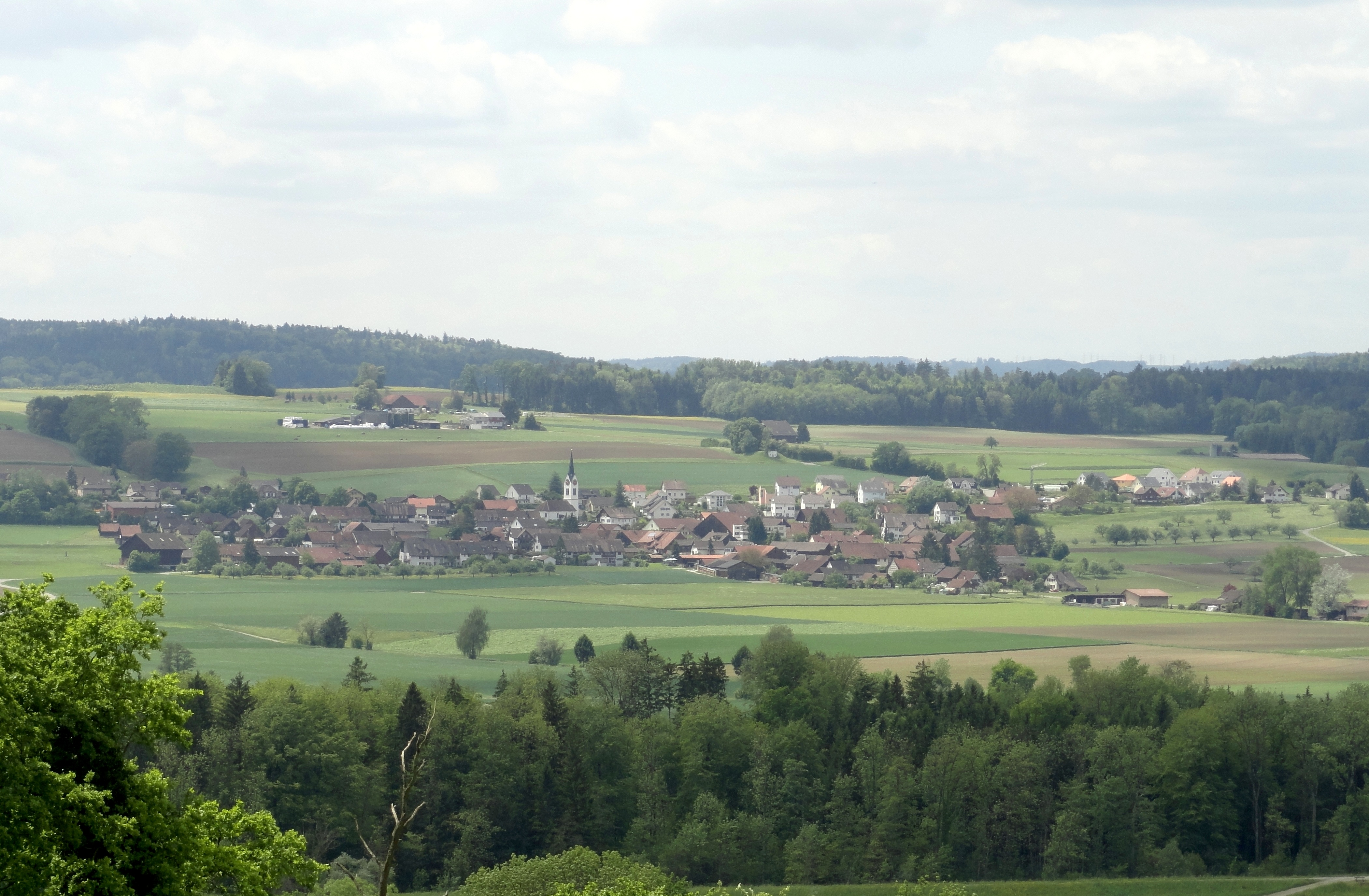 Altikon